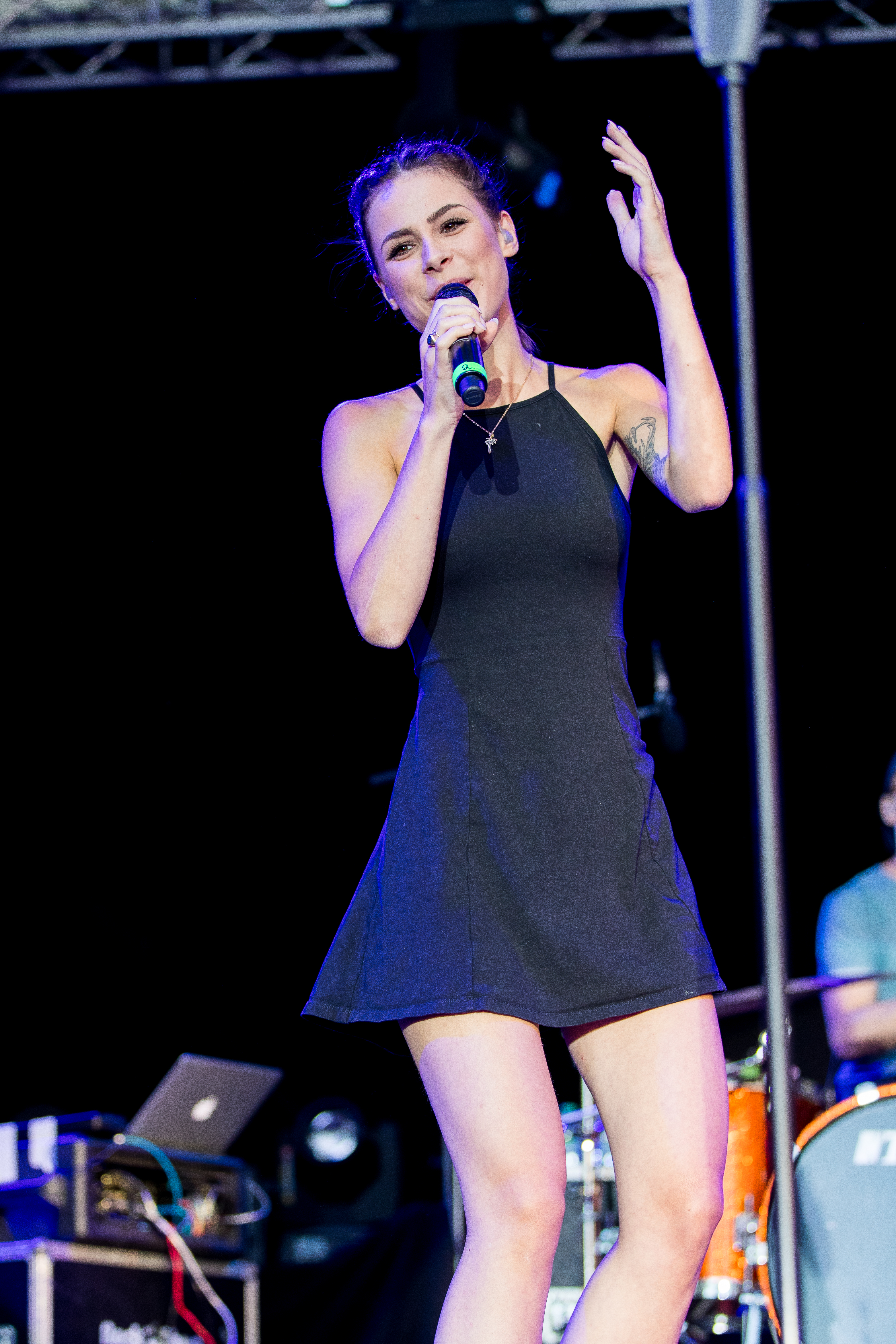 during Stadtfest Ludwigshafen at Stadt, Ludwigshafen, Rheinland Pfalz, Germany on 2016-07-09, Photo: Sven Mandel